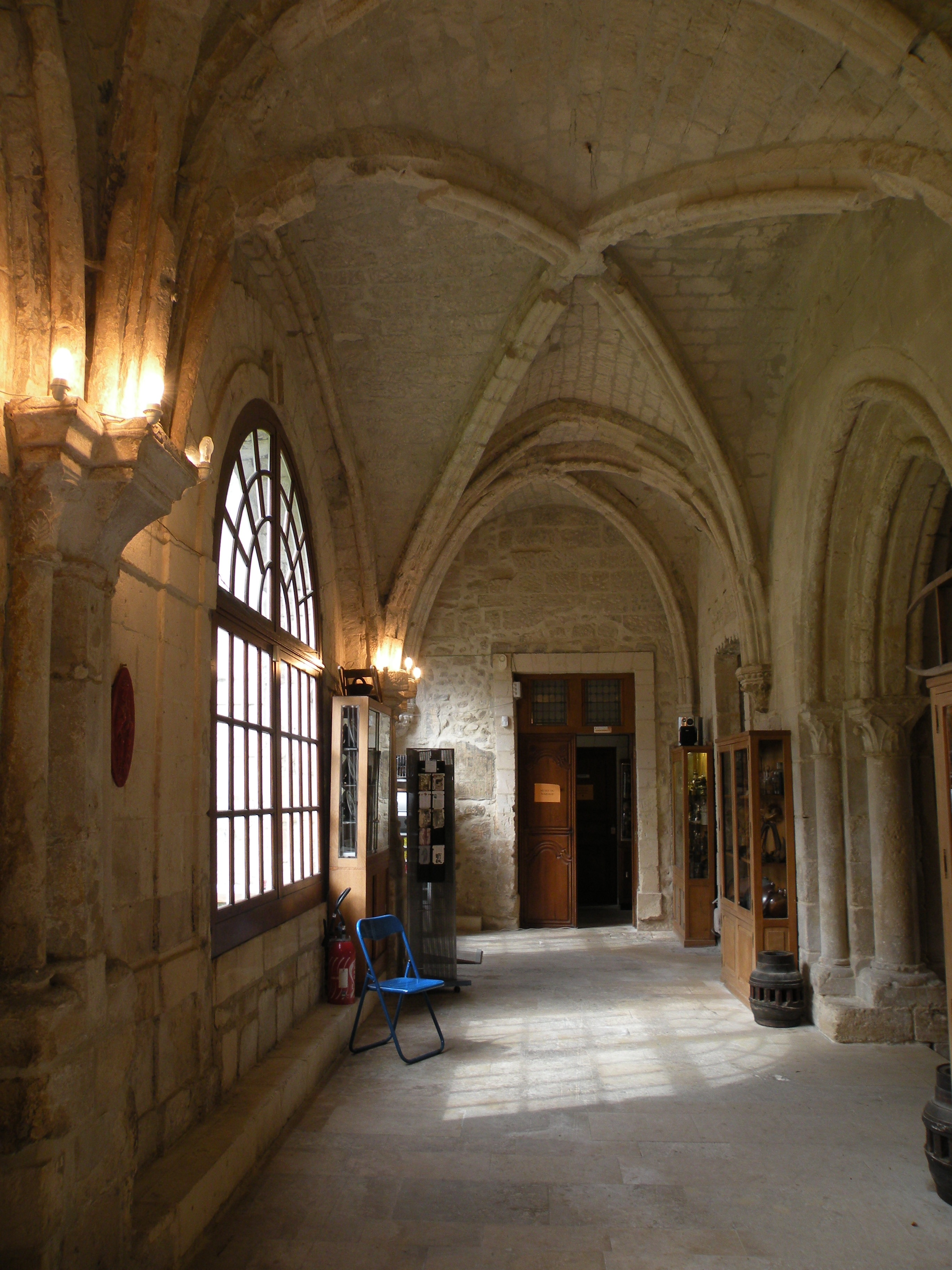 Galerie du cloître.